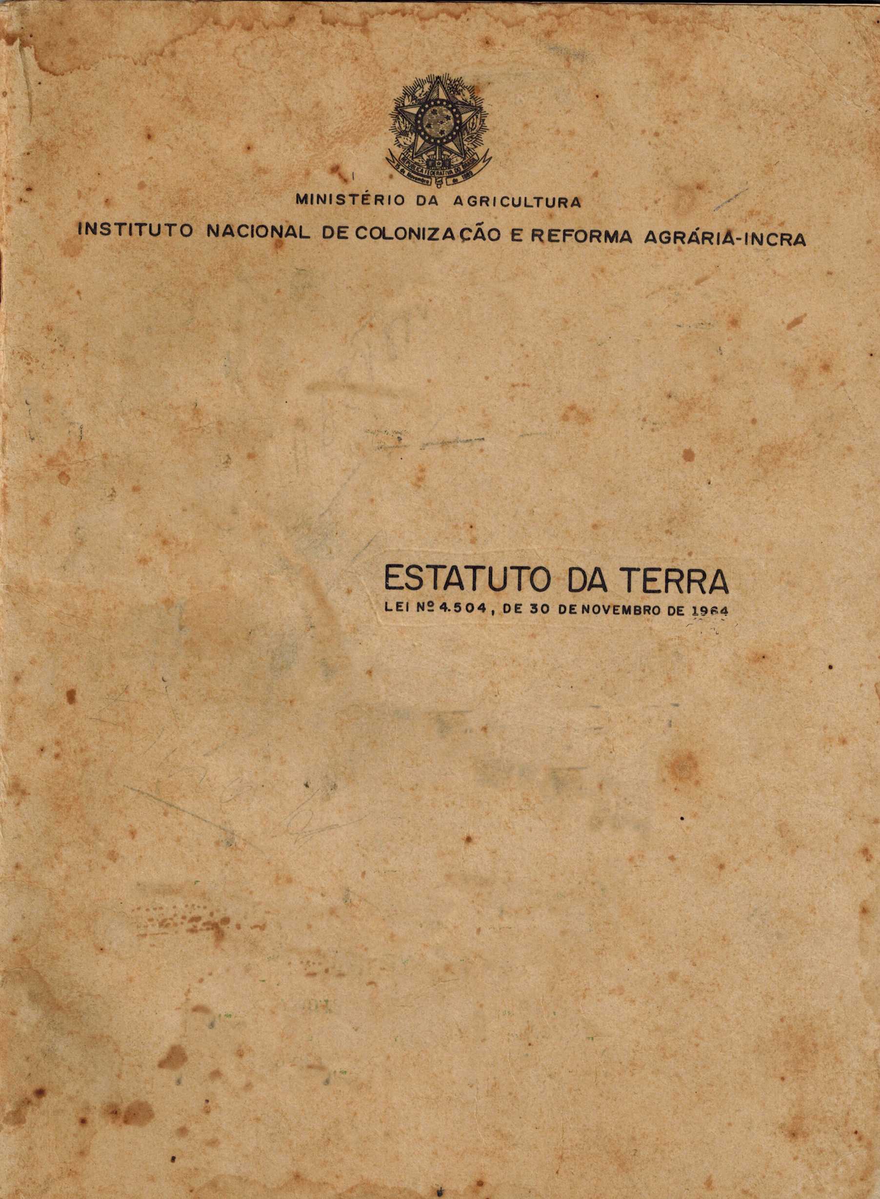 Estatuto da Terra, a Lei brasileira nº 4504, de 30 de novembro de 1964.